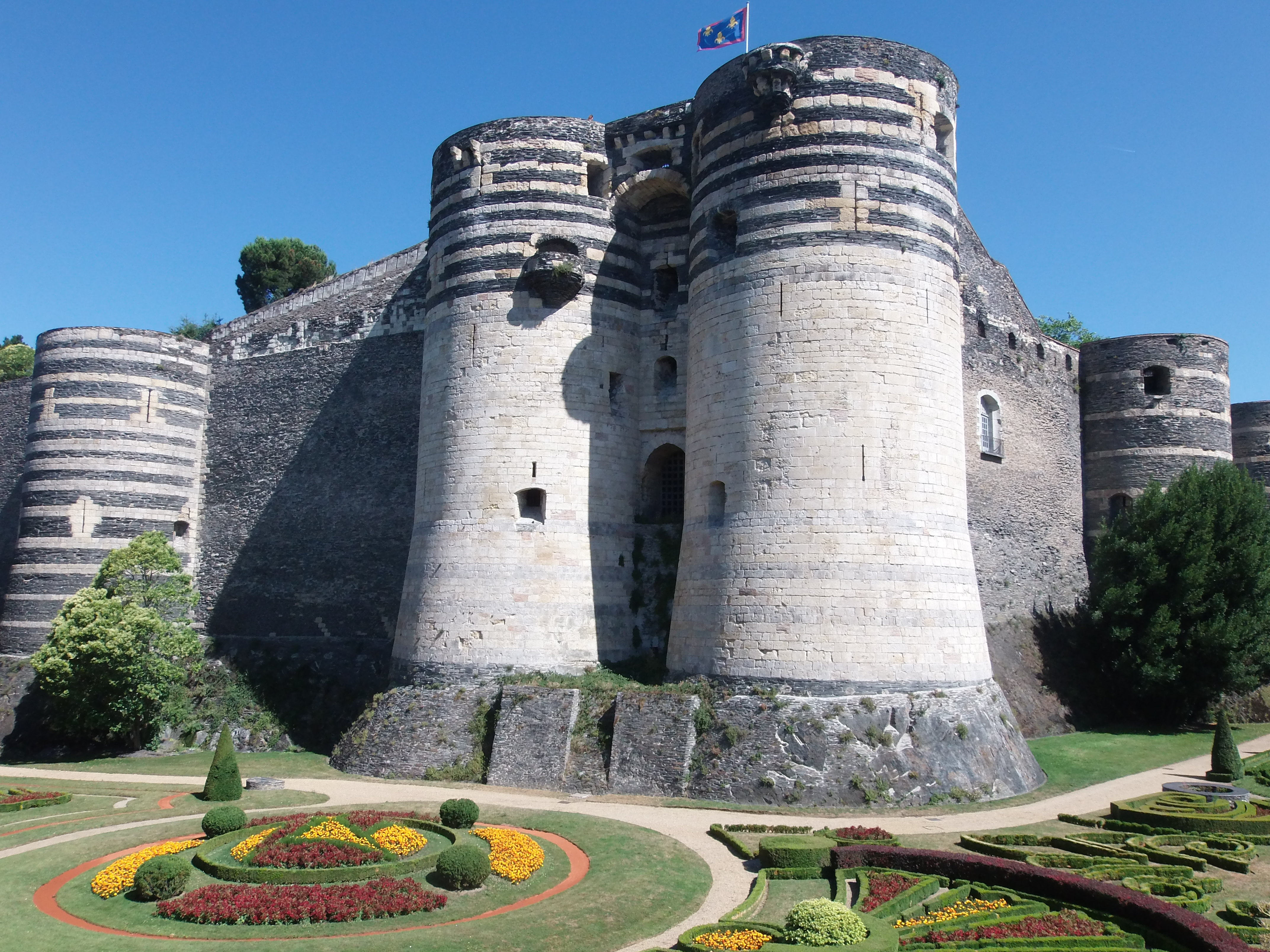 Le château d'Angers (Maine-et-Loire, France), aussi appelé château des ducs d'Anjou, des XIIIe-XVIe siècles. Prise de vue de juillet 2015.